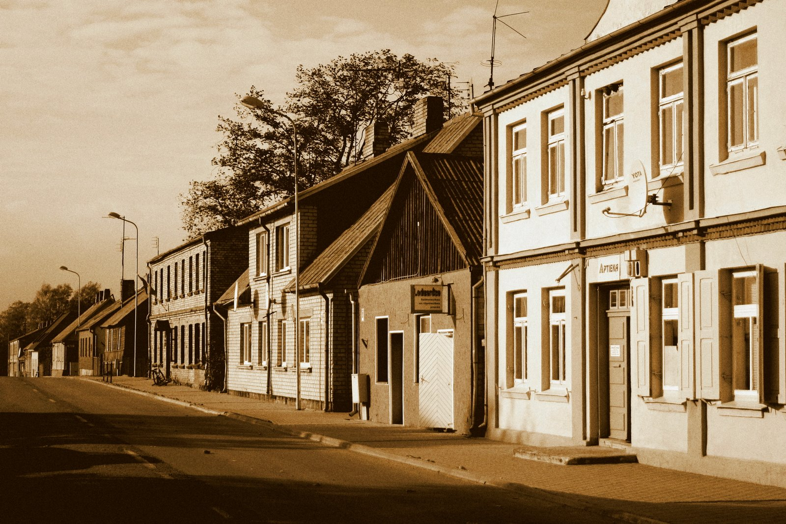 Dzintaru iela, Pāvilosta